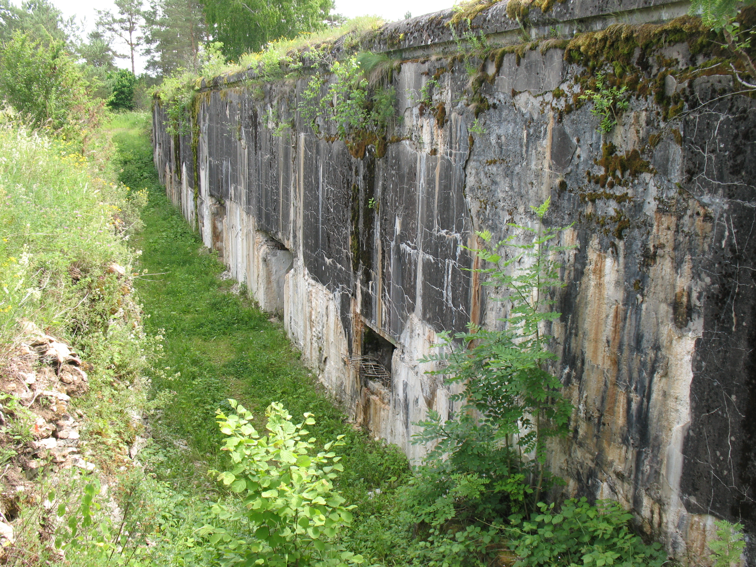 Harju maakond, Harku vald, Humala küla, Humala linnak